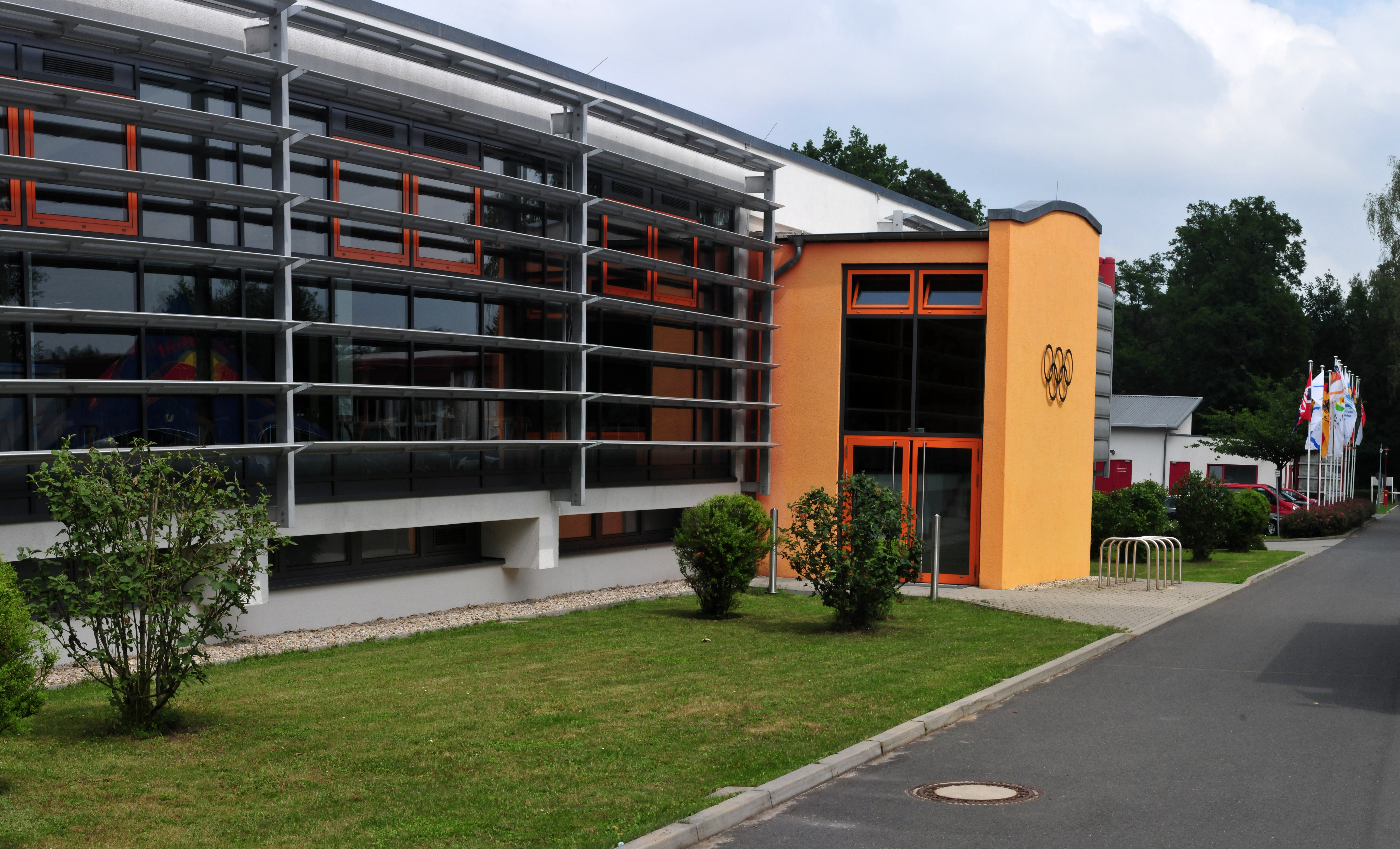 Pressetermin Olympiamannschaft in Kienbaum